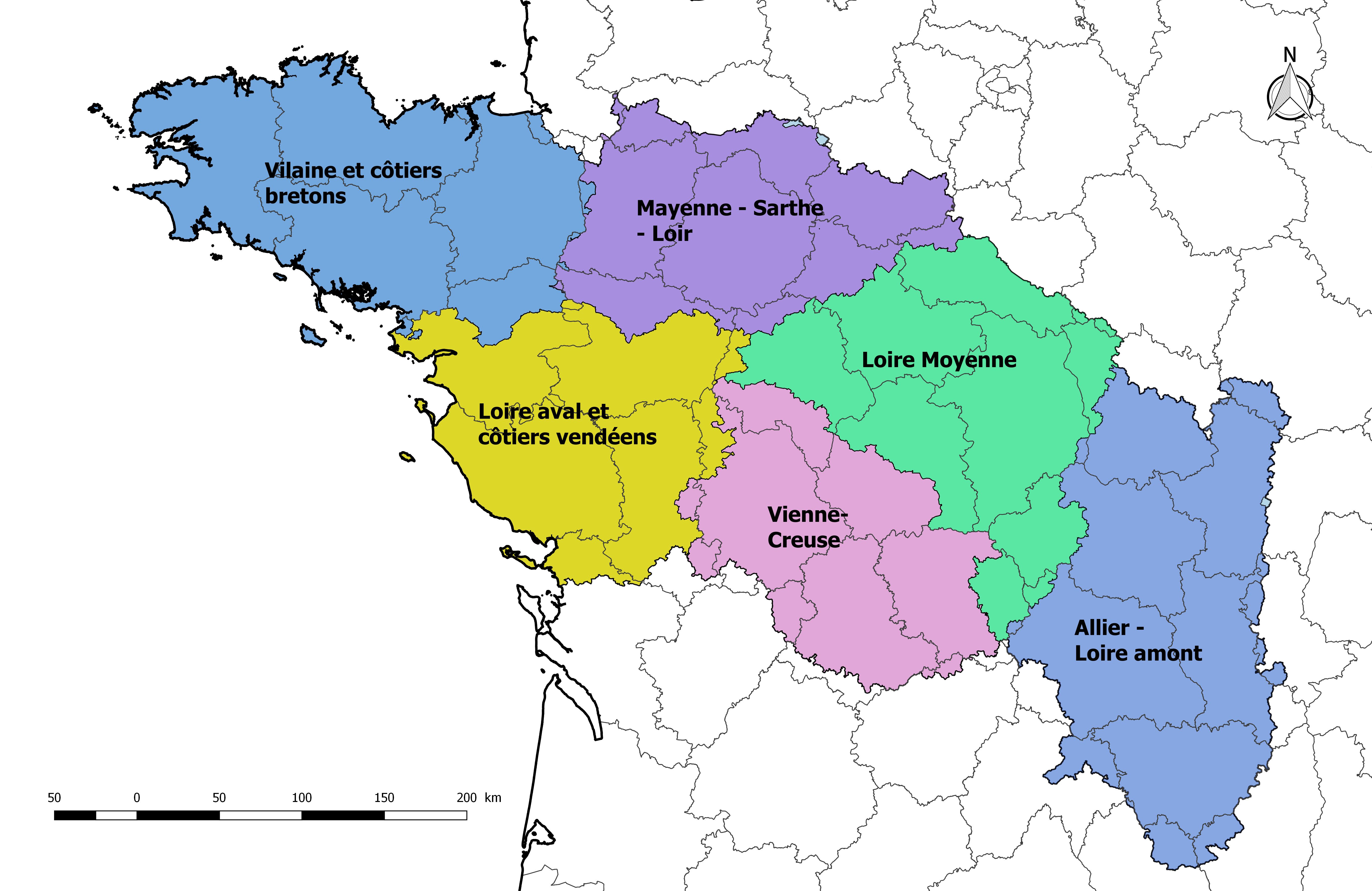 Carte de la circonscription de bassin -Loire-Bretagne en France, avec les sous-bassins qui la composent.